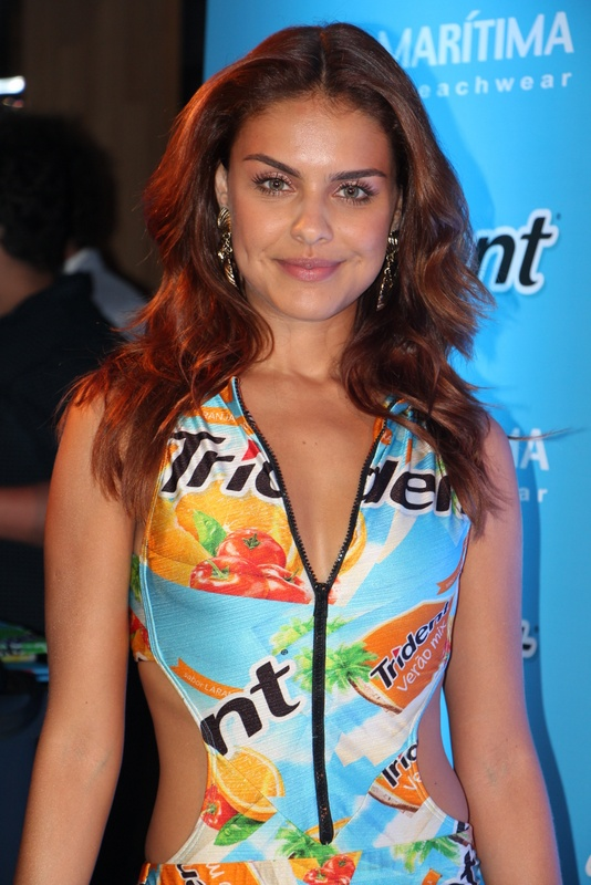 39 - Paloma Bernardi-009